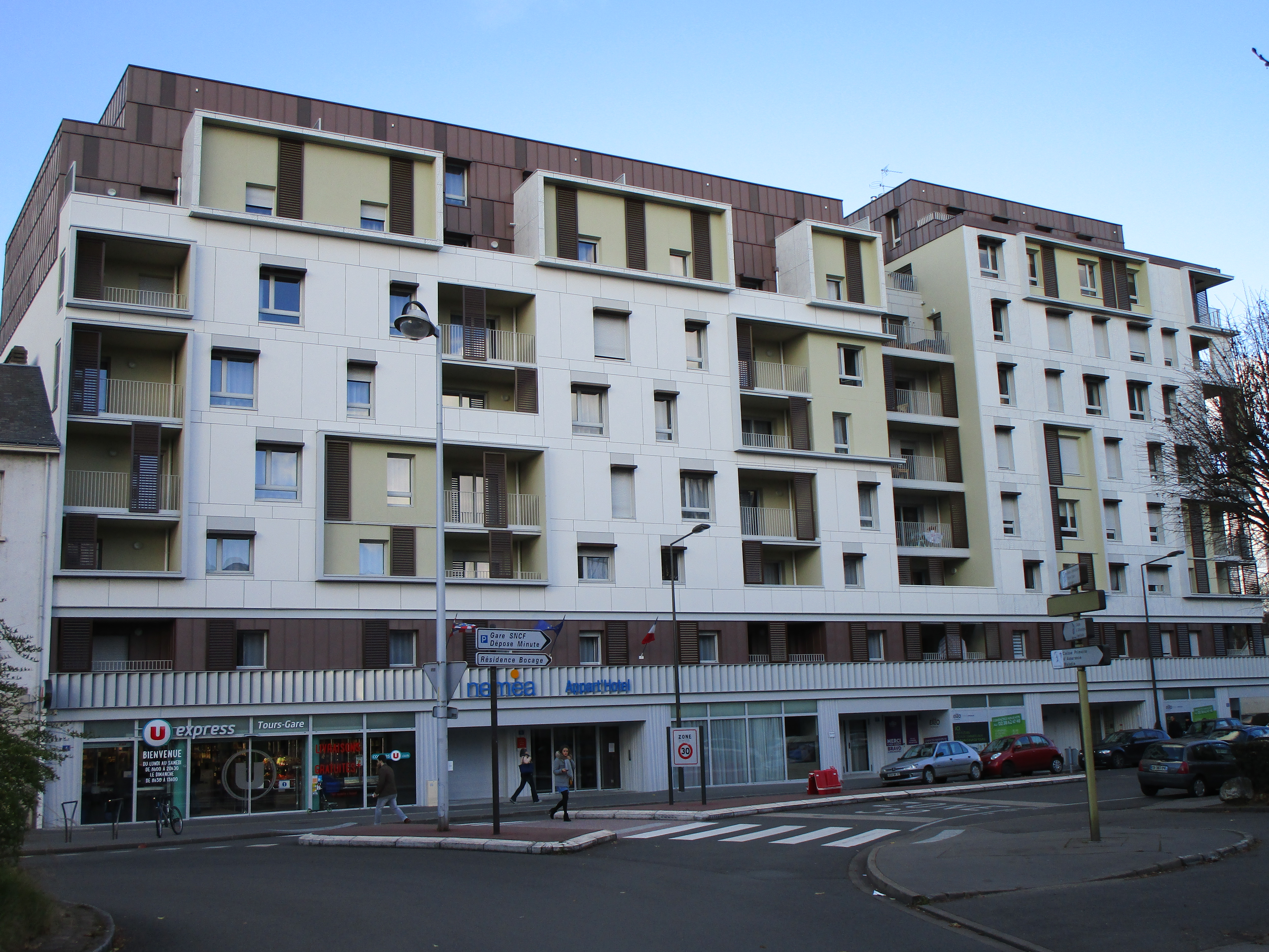 Immeuble sur la rue Marcel Tribut dans le quartier Velpeau de Tours.